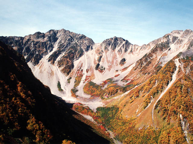 Sierra Hodaka en otoño. Foto por usario Inti-sol octubre de 2000.º 秋の穂高連峰 2000年10月投稿者自身の撮影